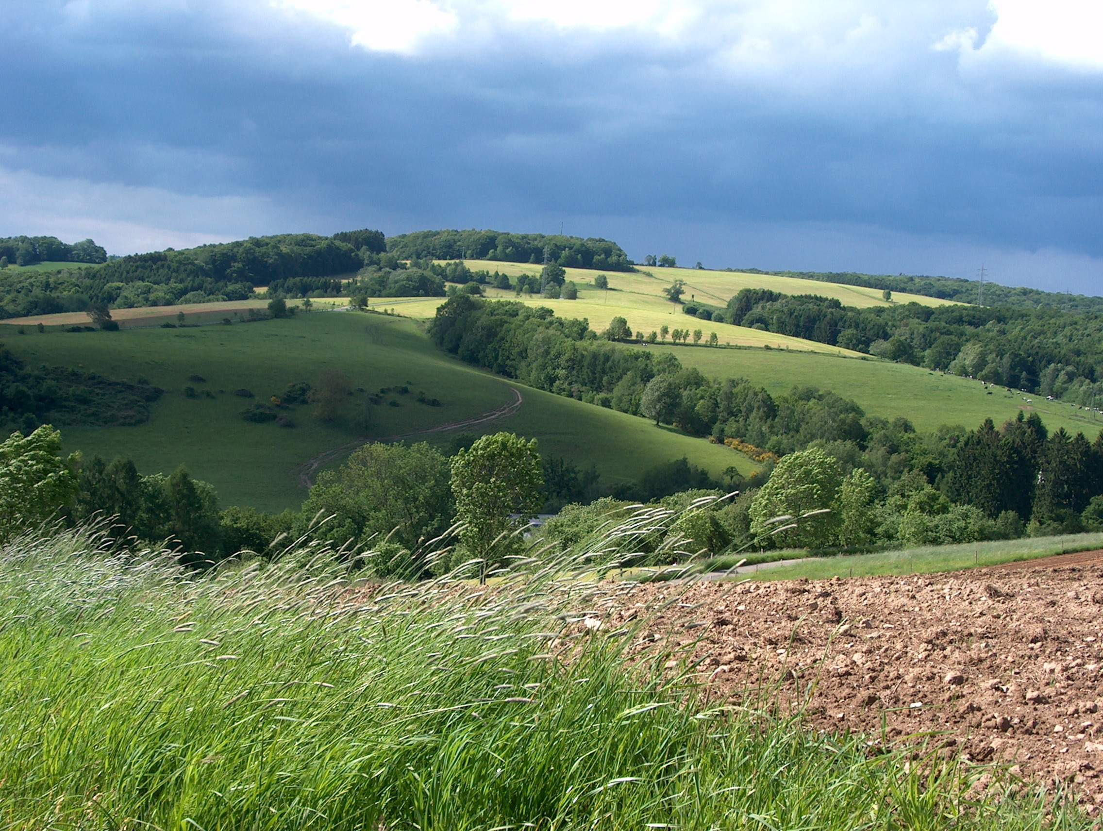 Ottersbachtal in Eitorf